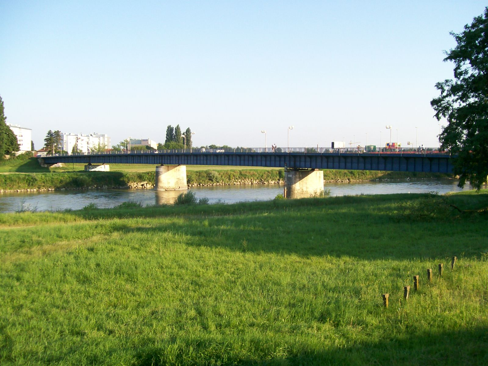 Pješački Savski most u Zagrebu